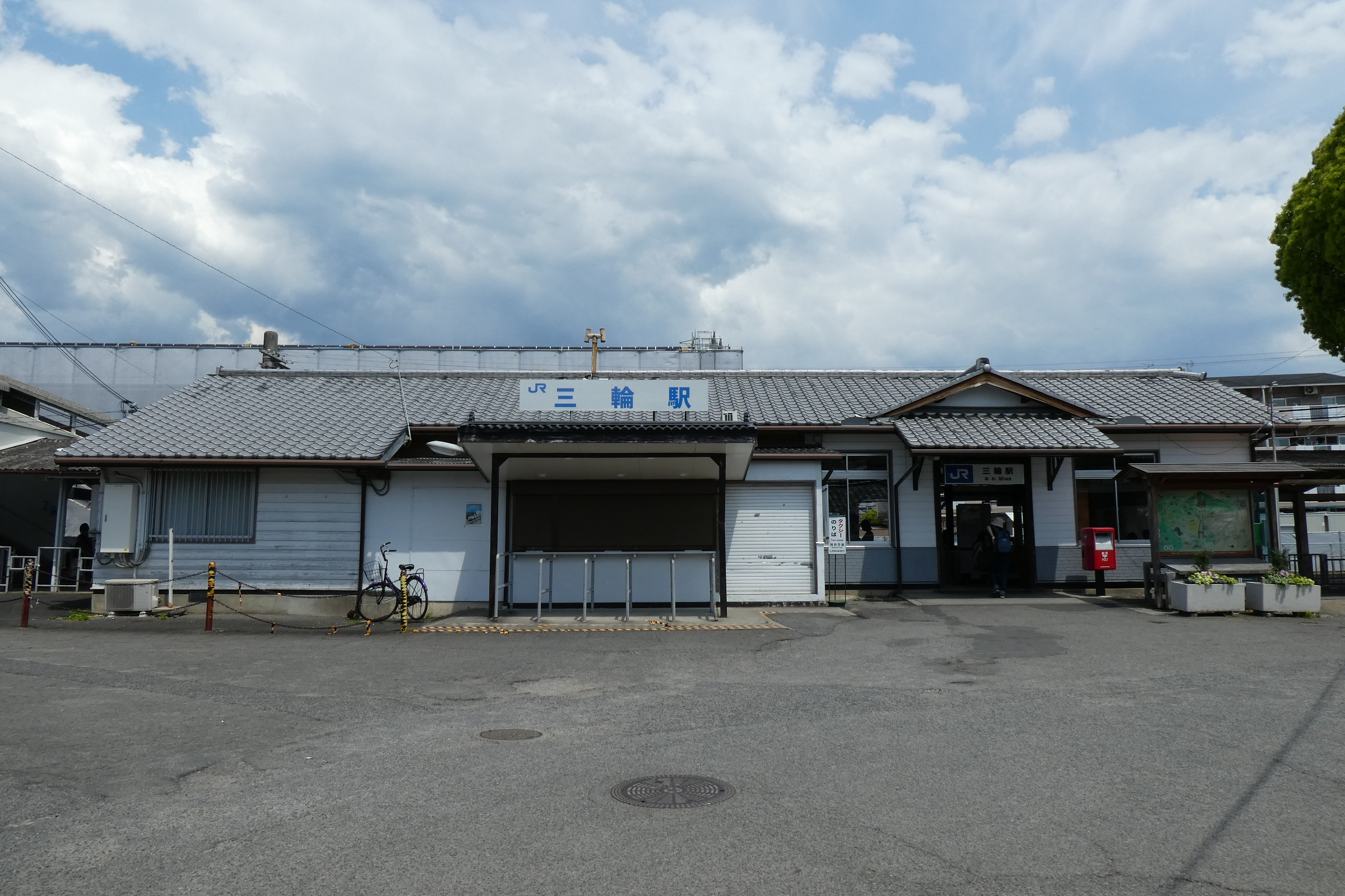 JR桜井線三輪駅駅舎。